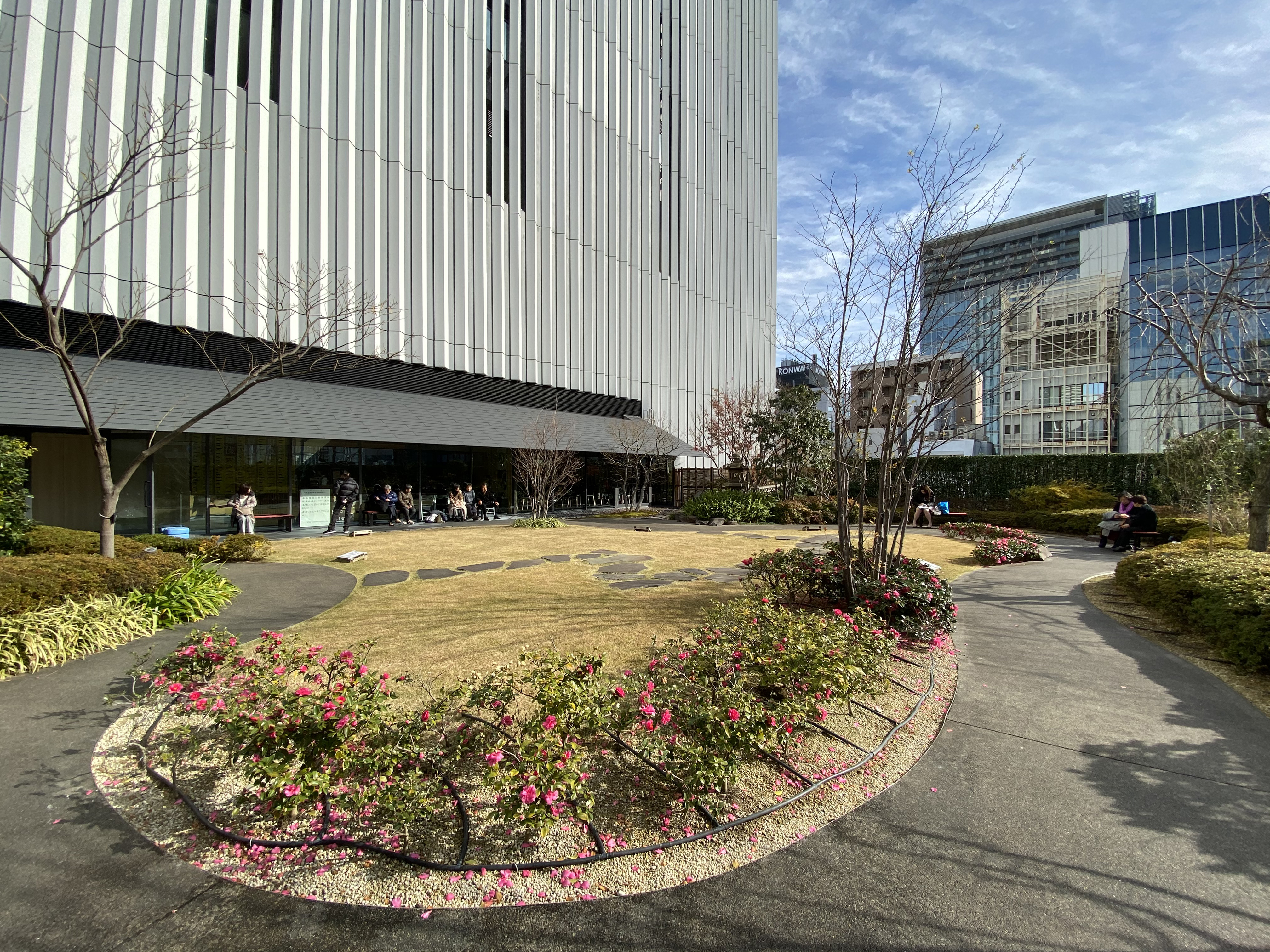 歌舞伎座屋上庭園